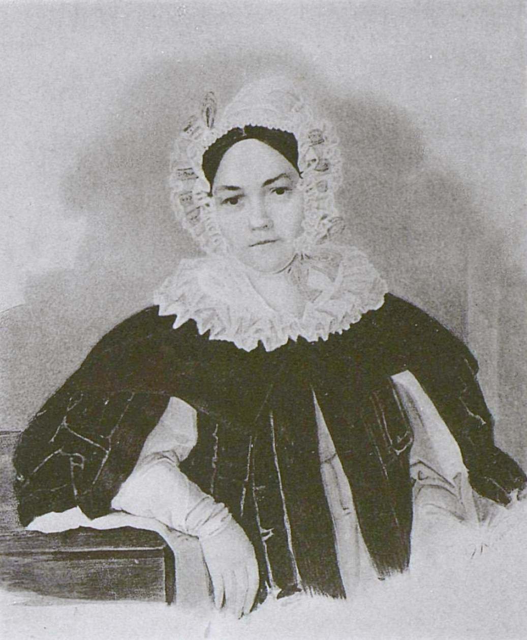 Екатерина Захаровна Канкрина, ур.Муравьева (15.10.1795 – 10.09.1849), кавалерственная дама, жена министра финансов граф Егор Францевич Канкрин (8.12.1774 – 21.09.1845).